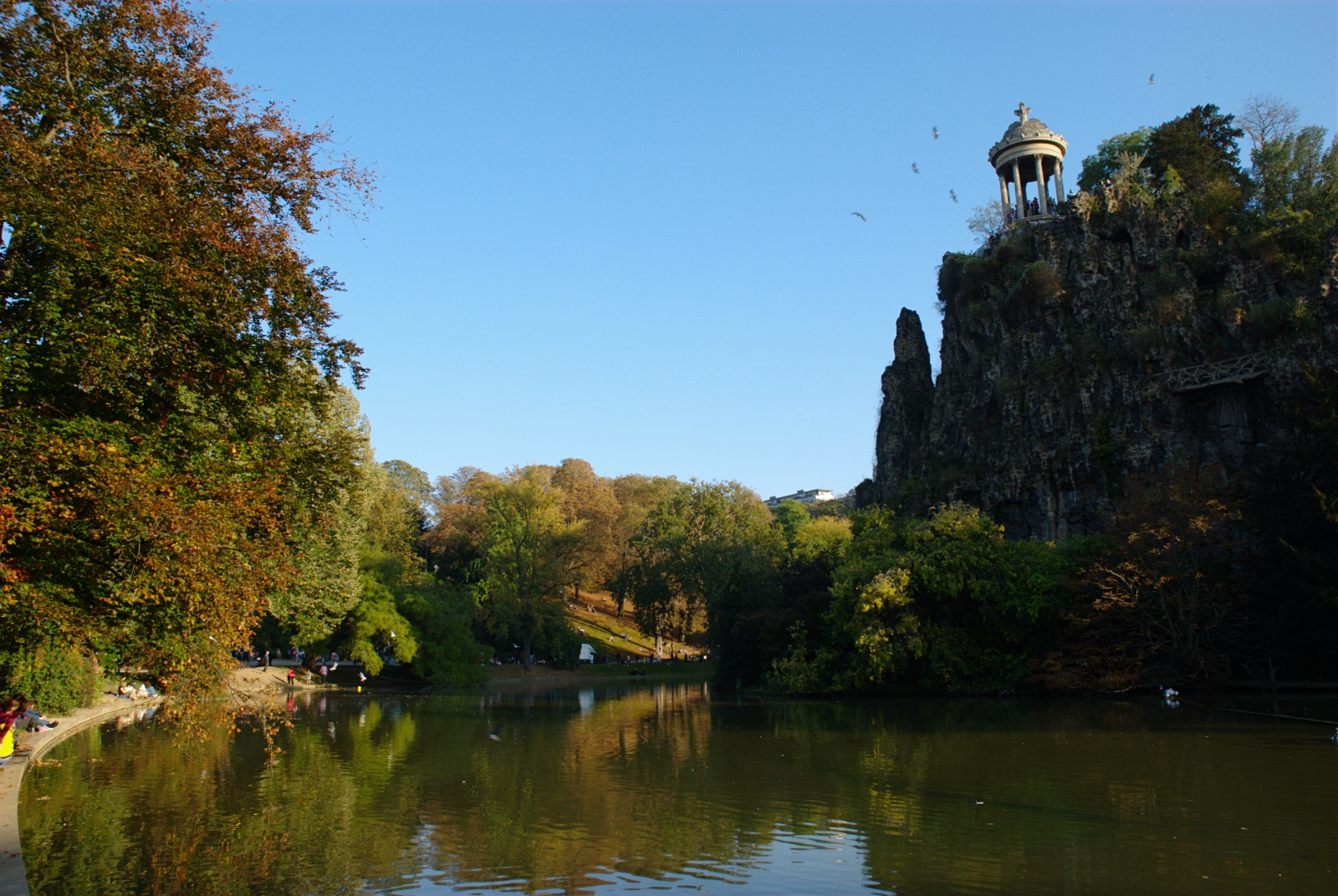 Parc des Buttes Chaumont in october